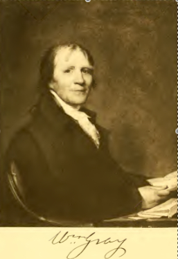 Wiliam Gray 1807